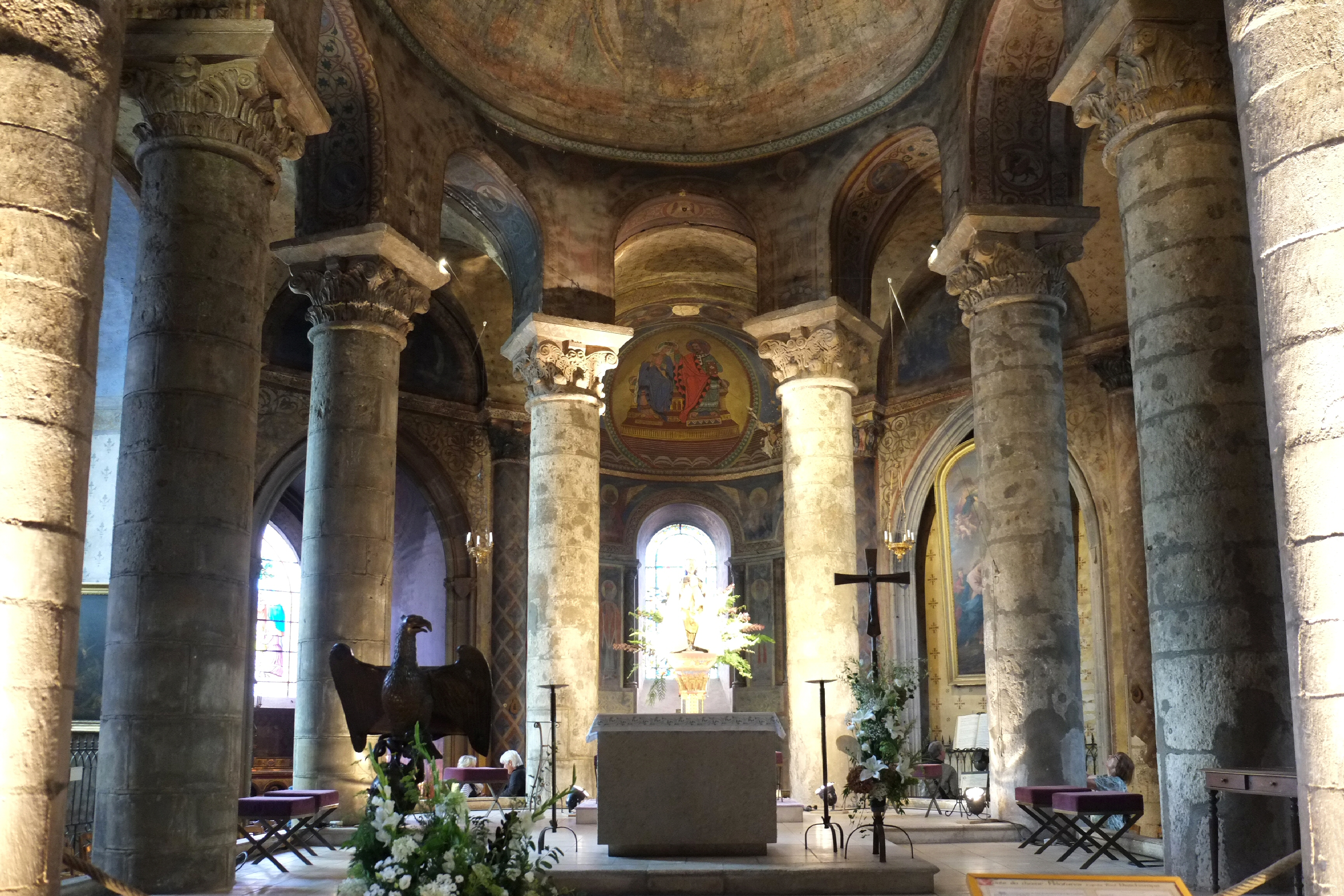 Choeur de l'église Notre-Dame-la-Grande Poitiers Vienne France .